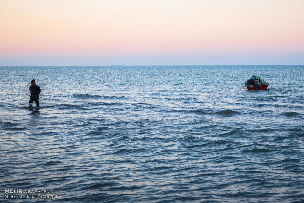 شرق بندر اميرآباد